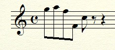 partition du code musical de Rencontre du Troisième Type, faite par moi-même.